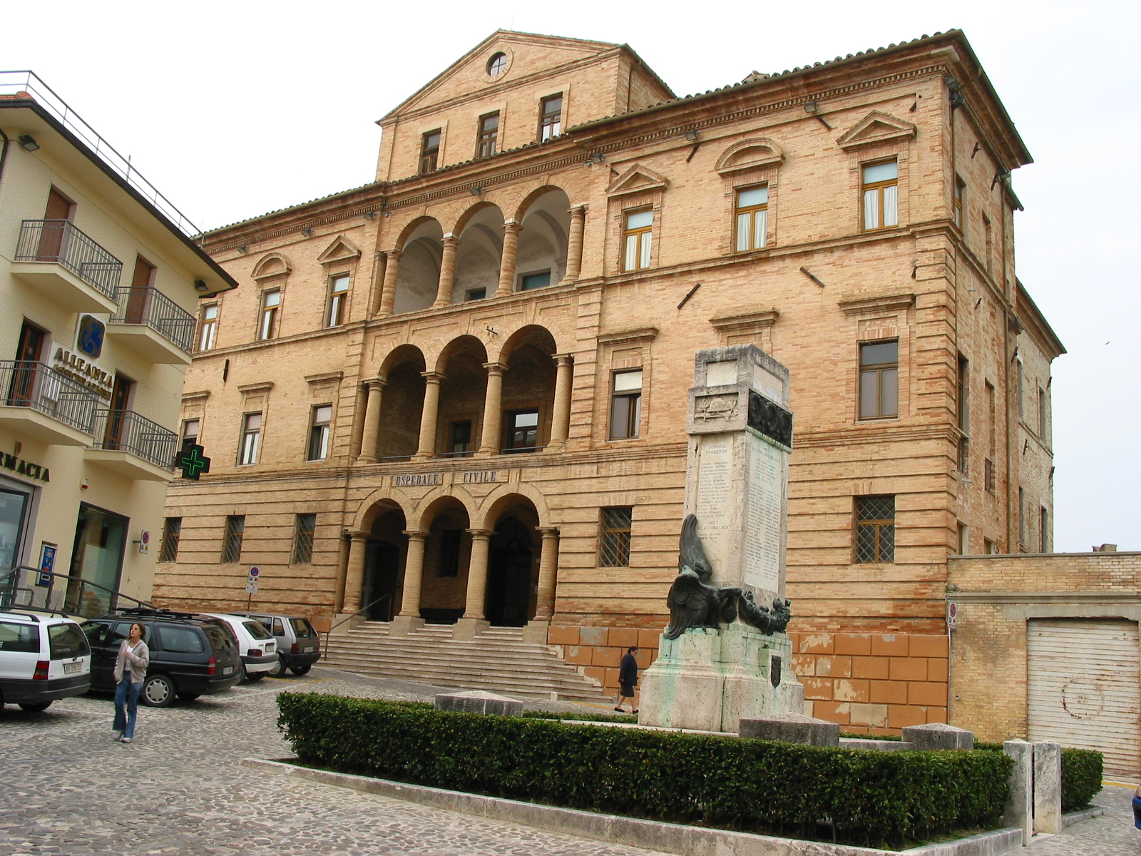 L'ospedale di Offida, opera di Pietro Maggi.ott.1.2003 Offida Hospital